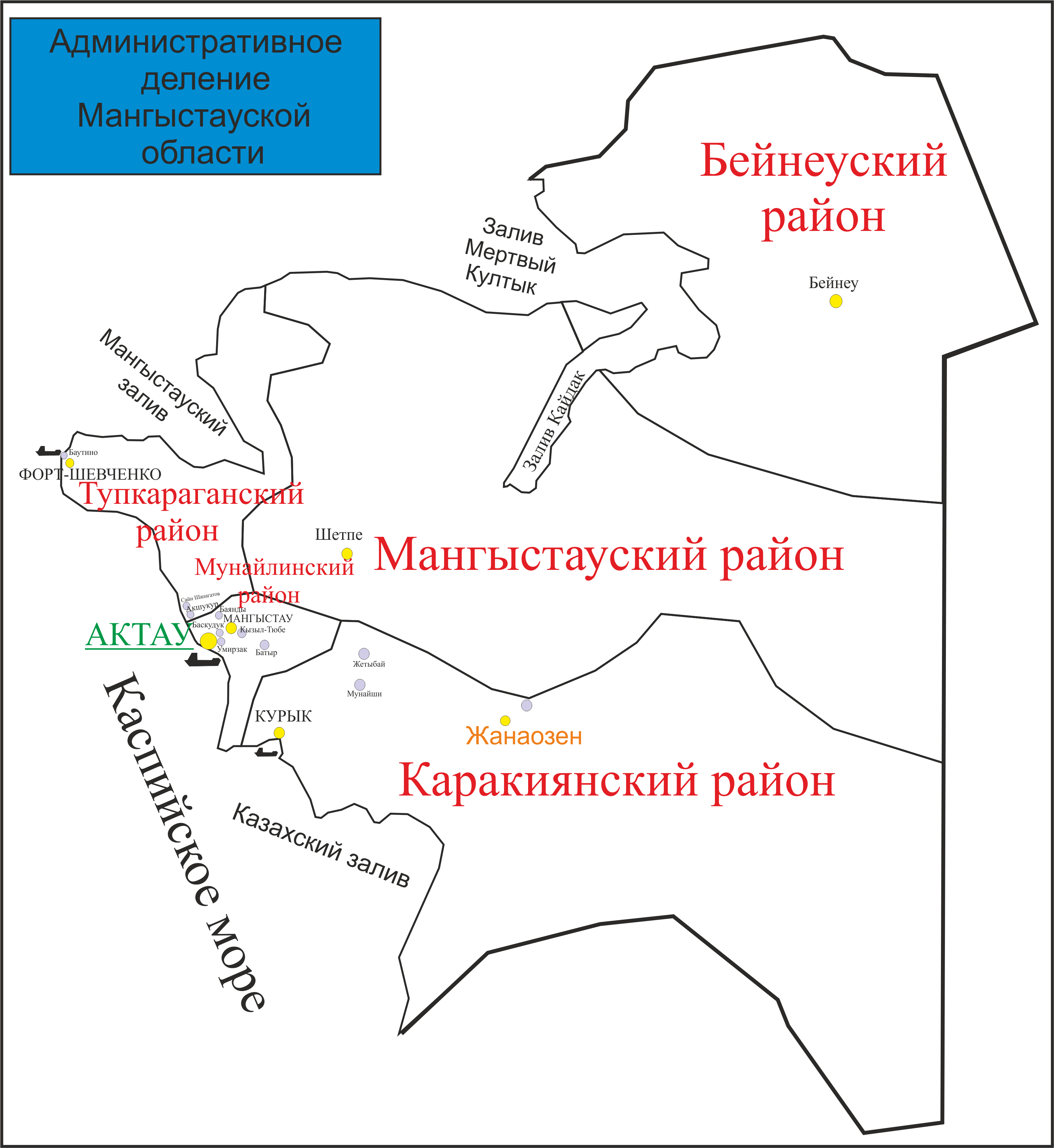 Административное деление Мангыстауской области